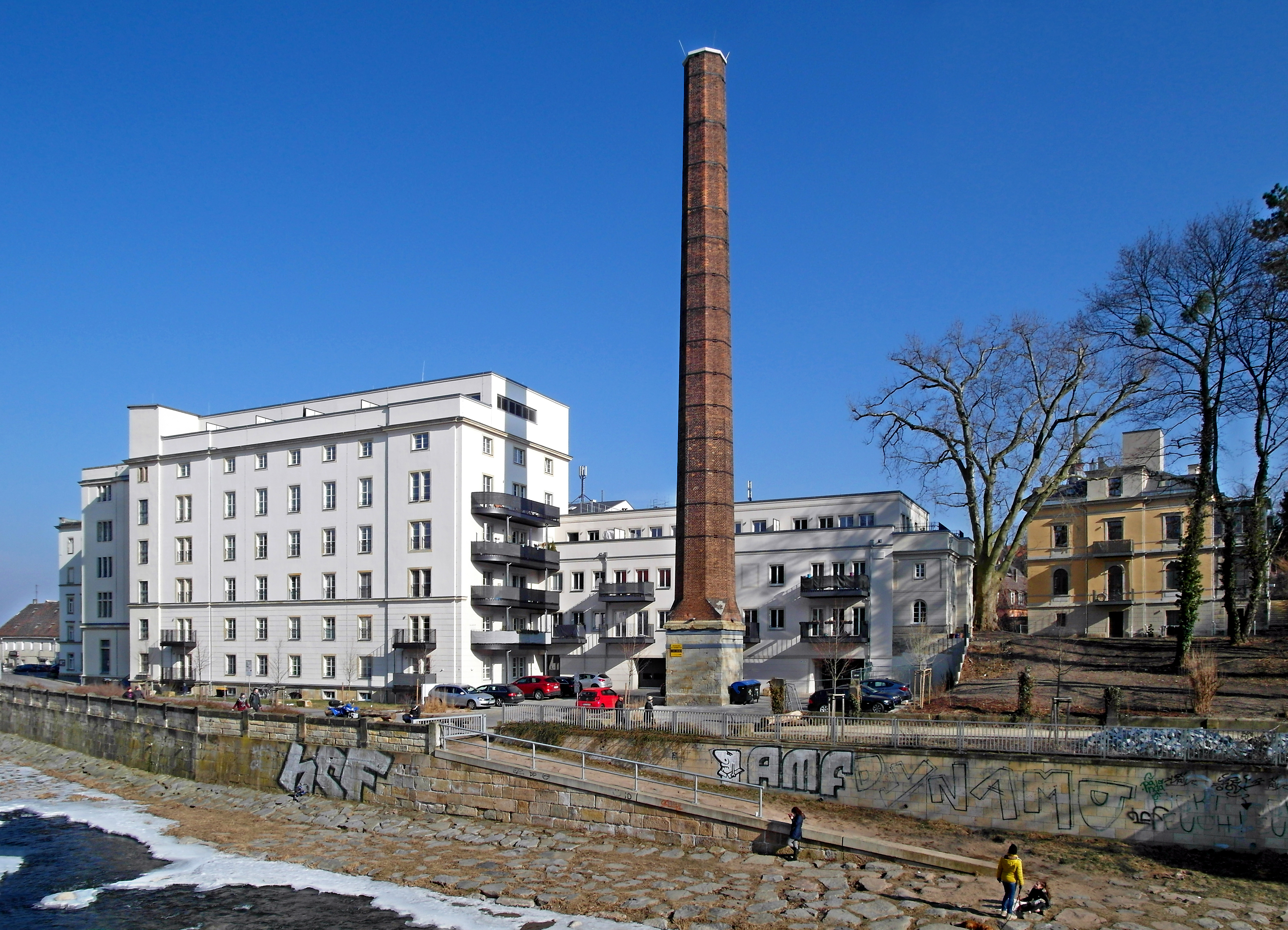 04.03.2018 01187 Dresden-Plauen: Blick von Südwesten zum Areal der Hofmühle / Bienertmühle, Altplauen (GMP: 51.029857,13.701976). Rechts der Mühlengebäude steht die Bienert-Villa von 1863, gerade frisch saniert. (GMP: 51.029190,13.702101). Die Weißeritz ist leicht vereist. [SAM4515.JPG]20180304240DR.JPG(c)Blobelt